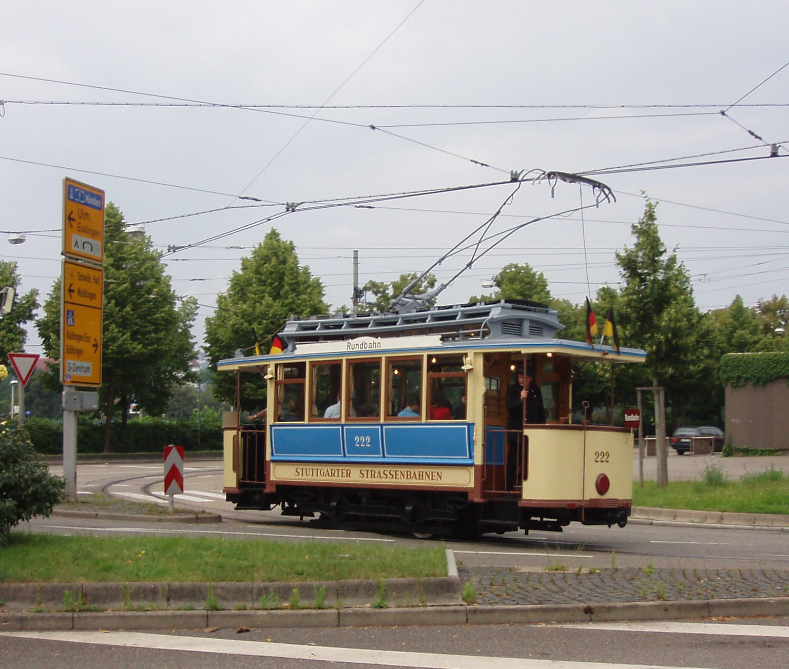 Stuttgarter Straßenbahnmuseum, historischer Triebwagen auf Rundfahrt